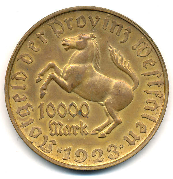 Monnaie émise pendant la période d'inflation par l'état de Westphalie en 1923